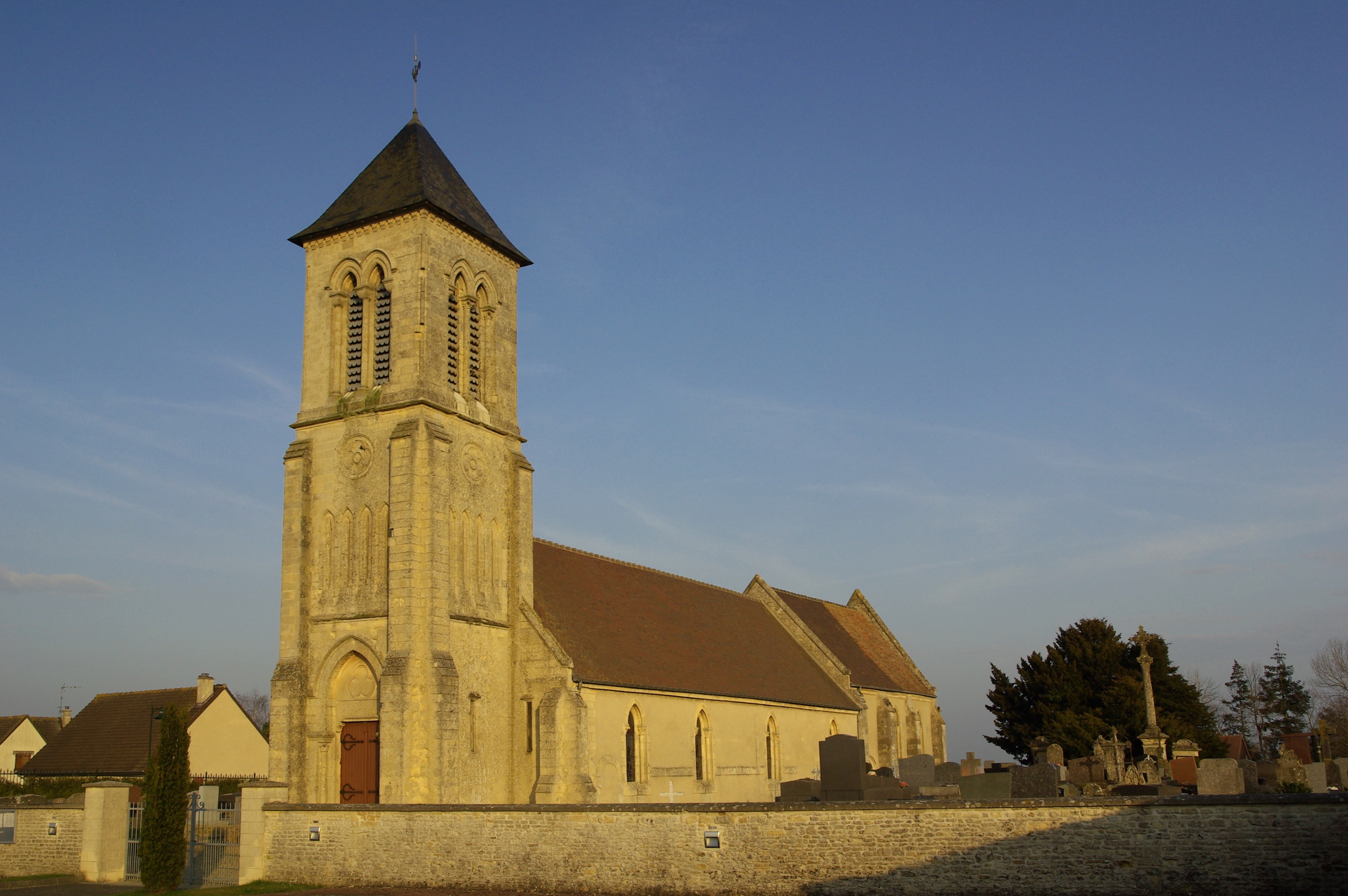 L'église de Cauvicourt, Calvados.